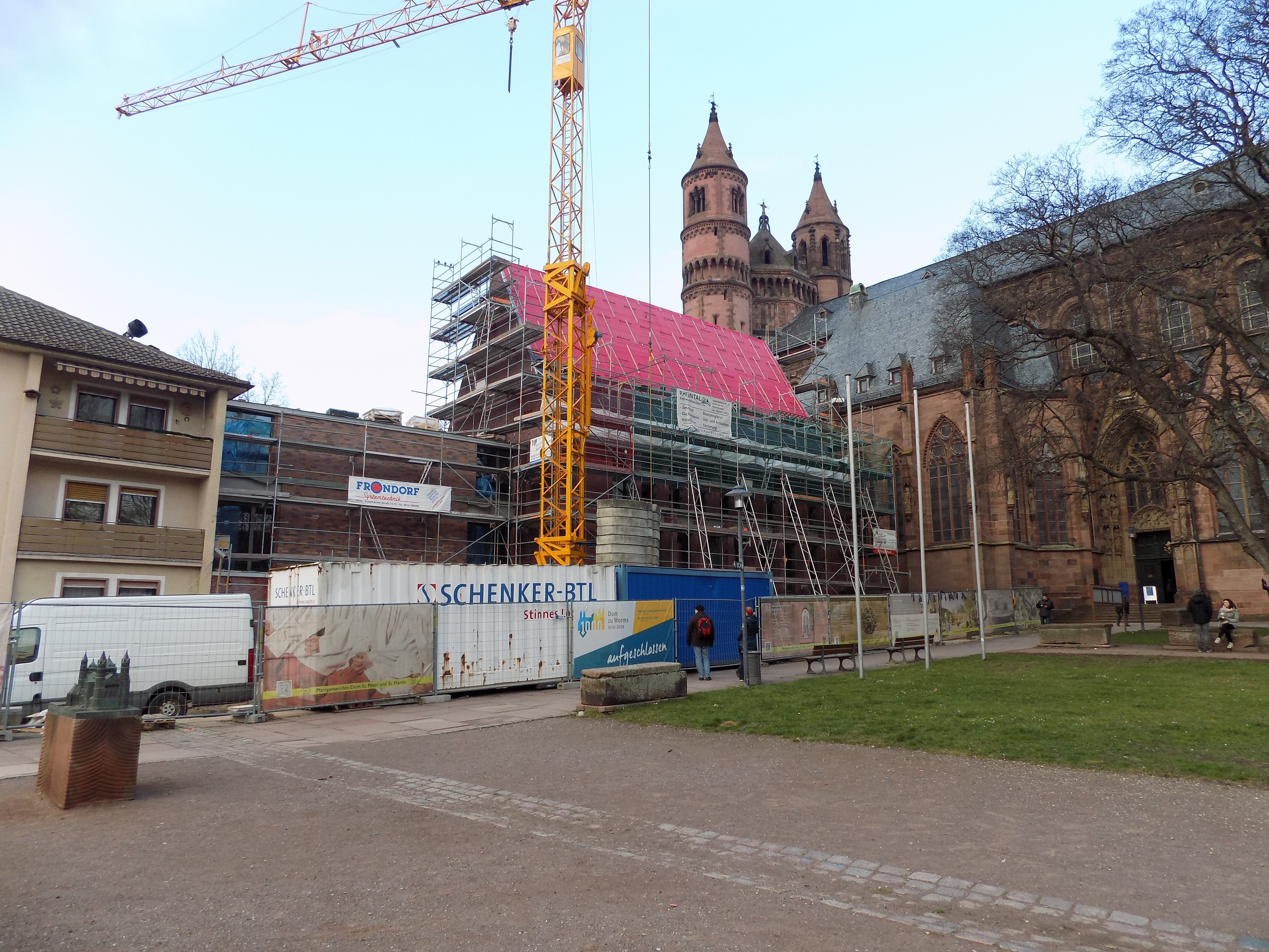 Haus am Dom (Worms) Bauphase Januar 2018